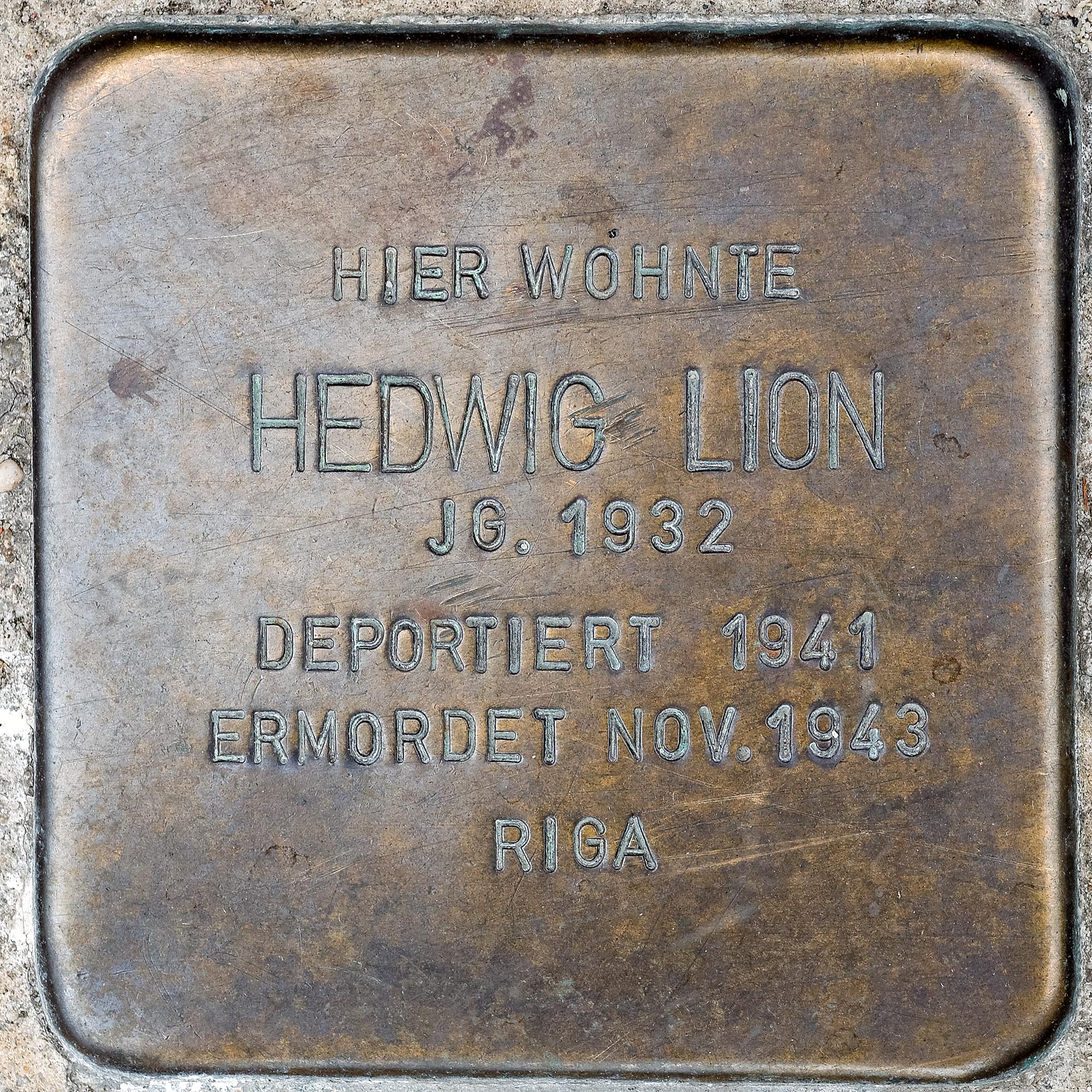 Stolperstein Lion, Hedwig